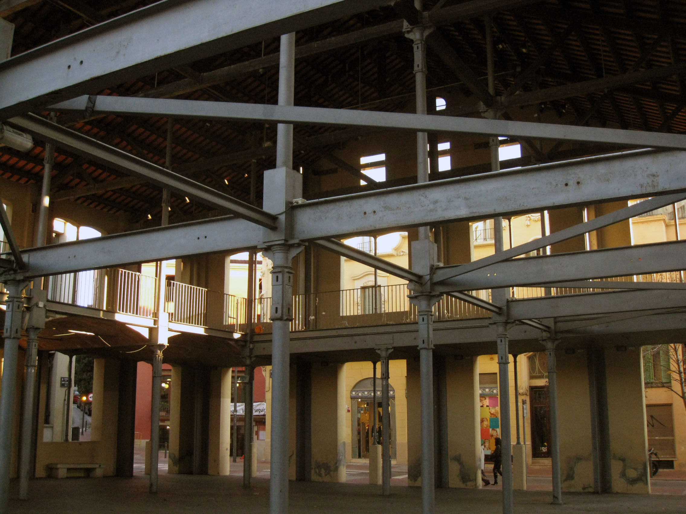 Quadra del Vapor Ventalló, obra de Lluís Muncunill de 1897, l'única conservada de l'antic Vapor Ventalló, a la cantonada entre els carrers de la Rasa i Sant Llorenç (Terrassa).